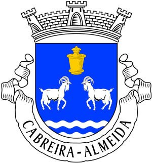 Blason Cabreira-Portugal